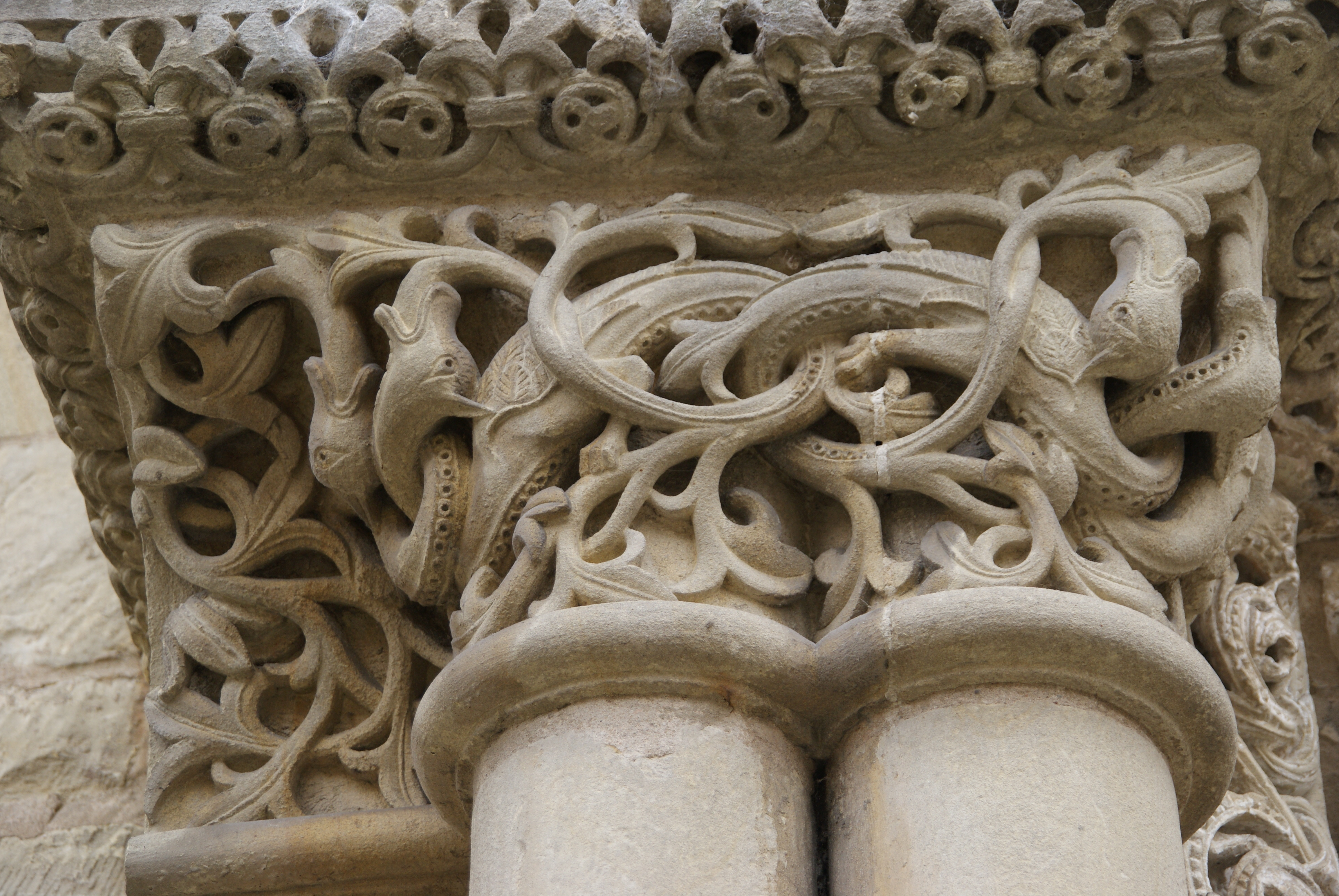 St. Johannis der Täufer, romanische Hallenkirche, Kapitell des HauptportalsThis is a photograph of an architectural monument., no. 10